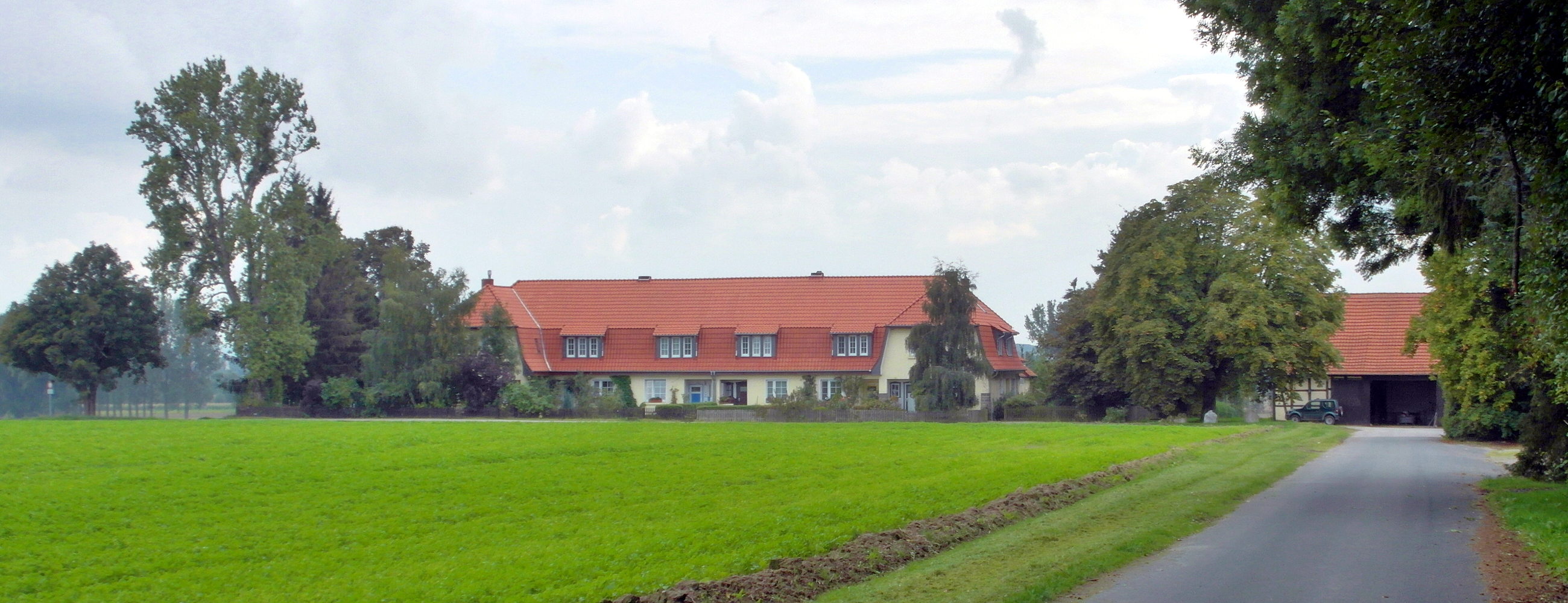 Rittergut Bockerode gesehen von der Zufahrtsstraße aus Richtung Mittelrode.